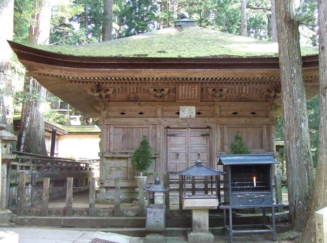 高野山 奥院経蔵